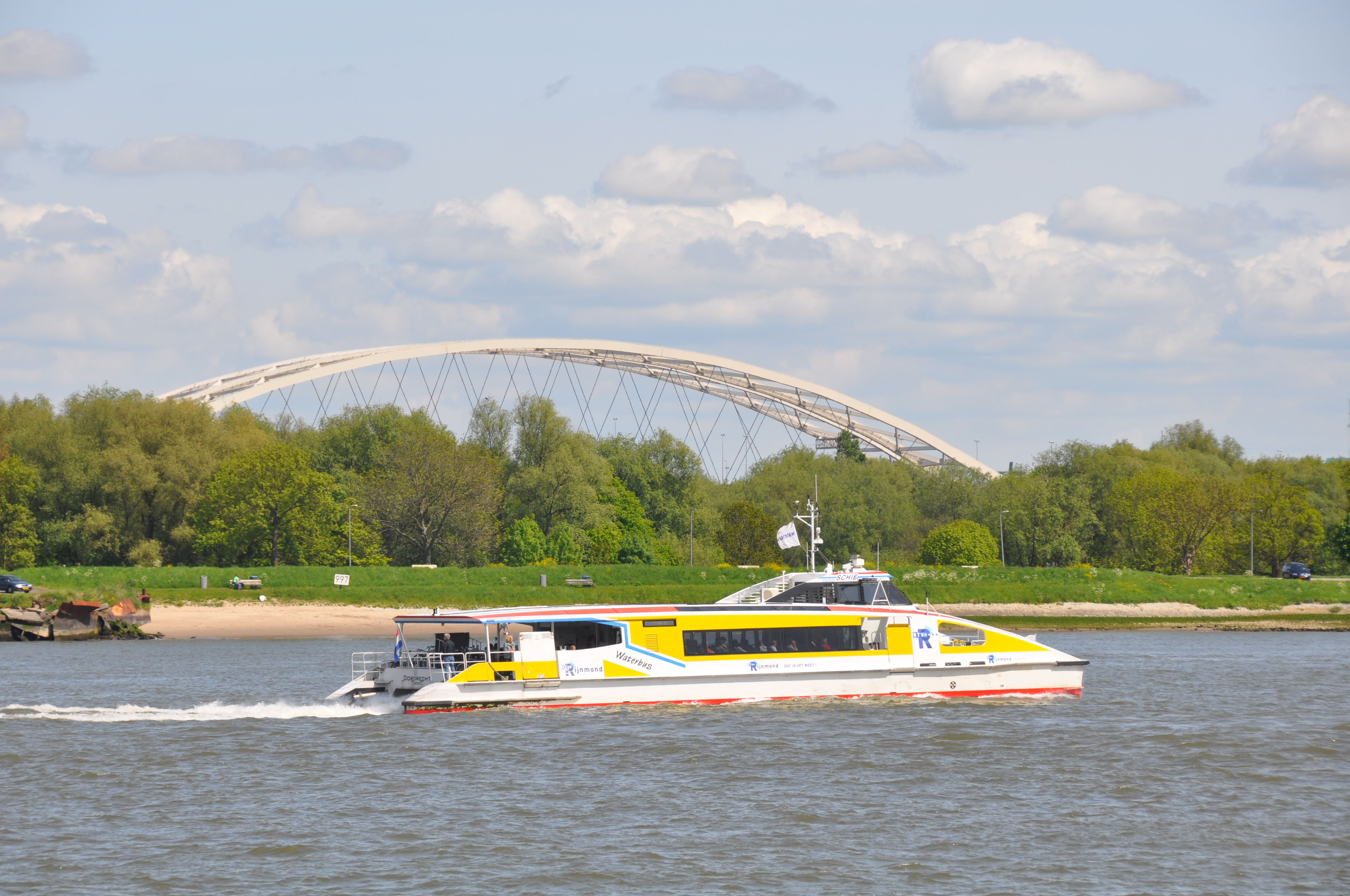 Waterbus SCHIE in de opvaart op de Nieuwe Maas voor Rotterdam